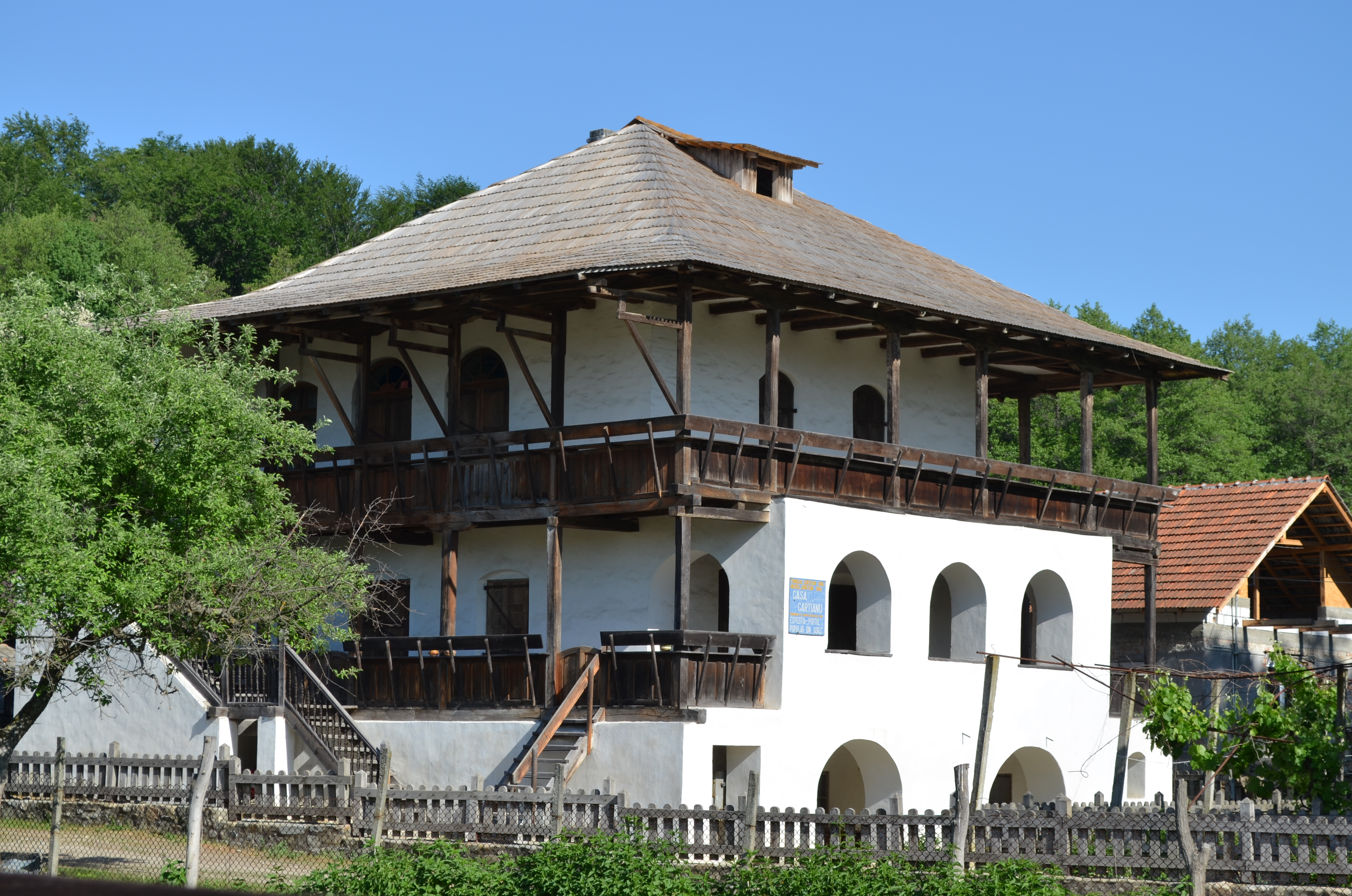 Cula Cartianu, satul Cartiu, comuna Turcinești, județul Gorj